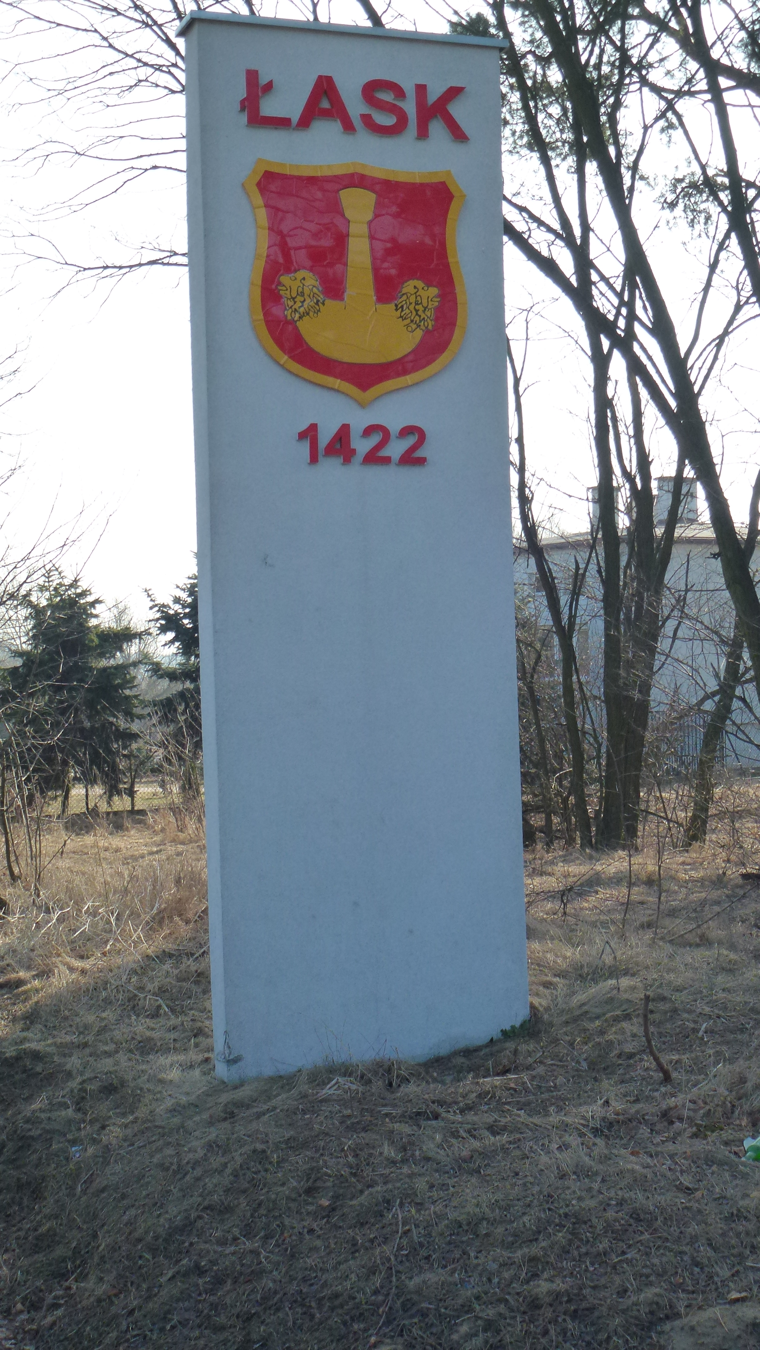 Łask, witacz